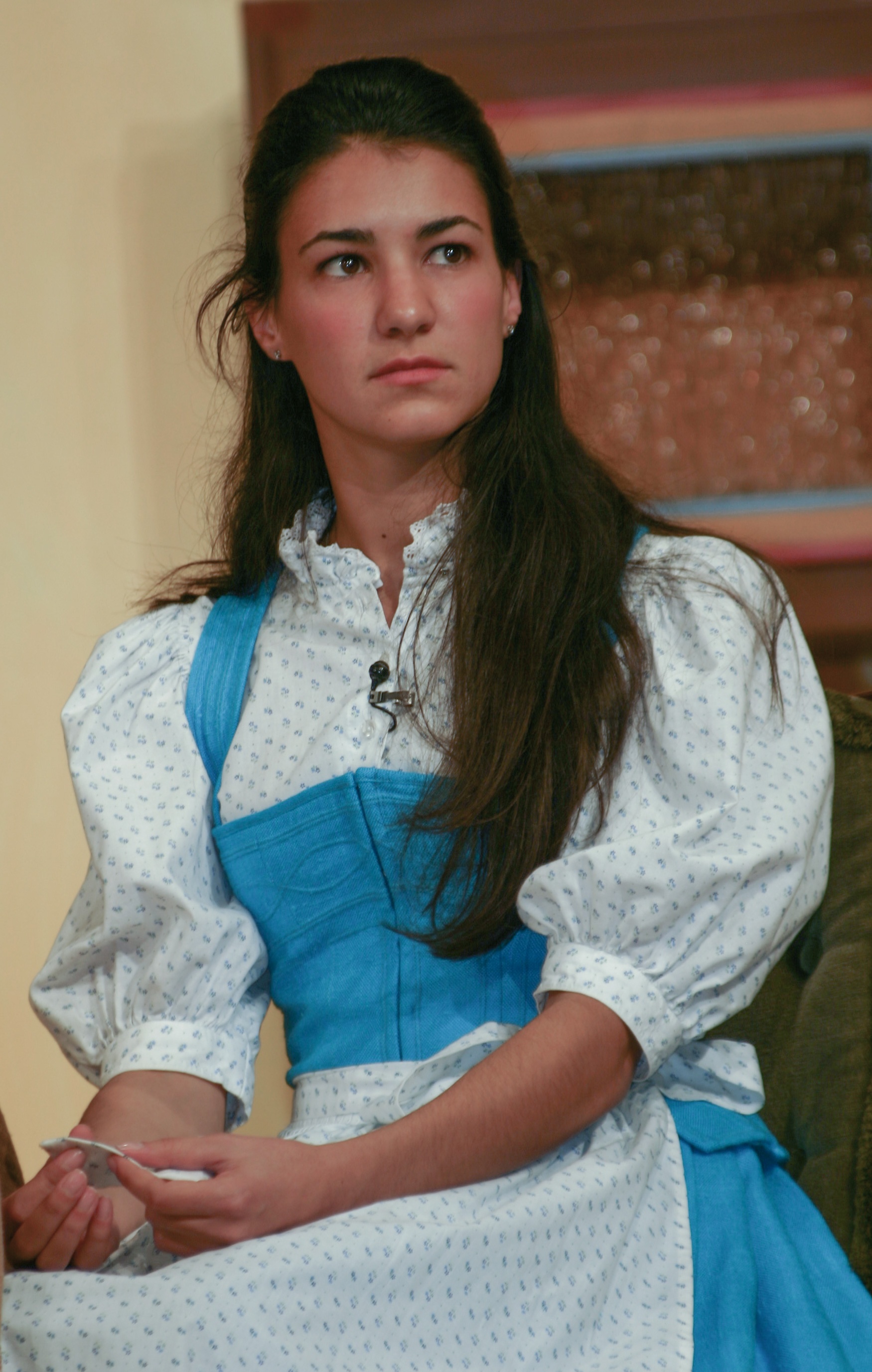 Rosetta Pedone (* 27. April 1983 in Hausham, Oberbayern) in Peter Steiners Theaterstadl. Pedone ist eine deutsche Schauspielerin.